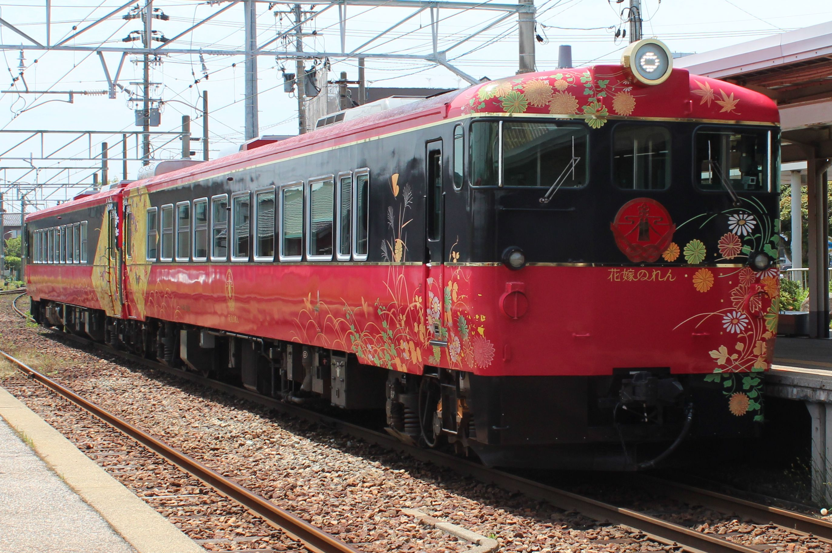 JR西日本キハ48系 七尾線ja:花嫁のれん_(列車) 羽咋駅で撮影